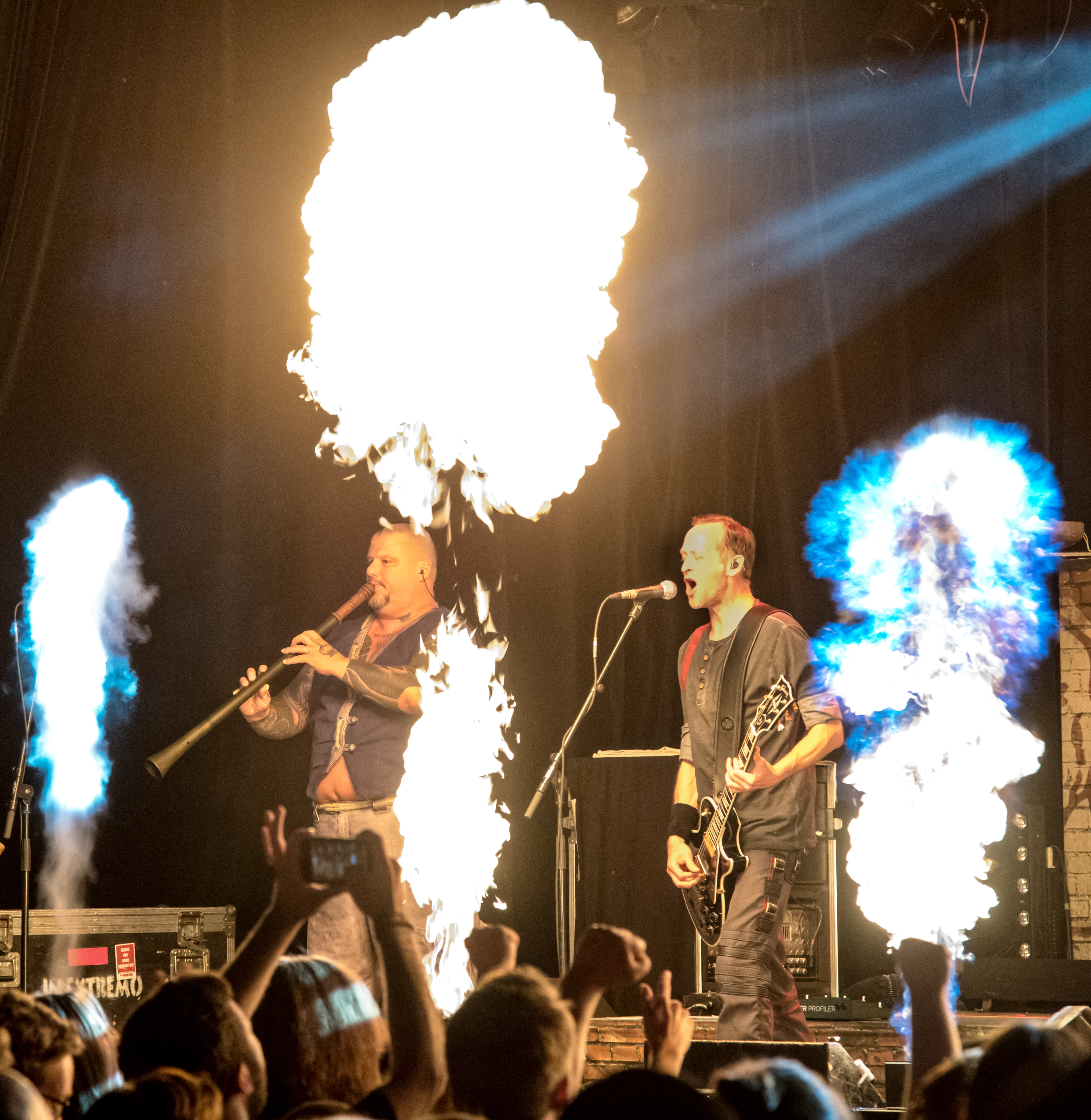 Bilder vom Zelt Musik Festival 2018 in Freiburg im Breisgau In Extremo am 29.07.2018 im Zirkuszelt